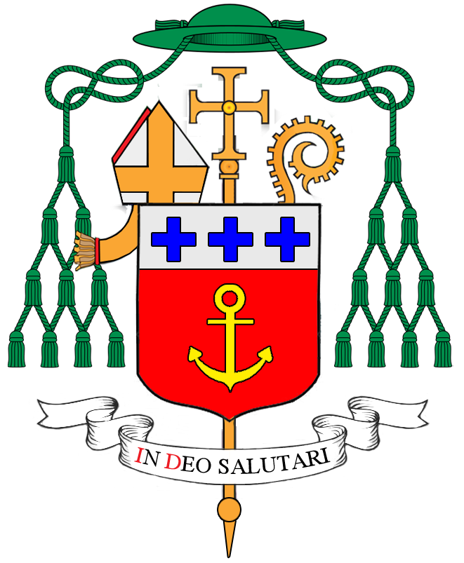 Wapenschild van Leonce Albert Van Peteghem